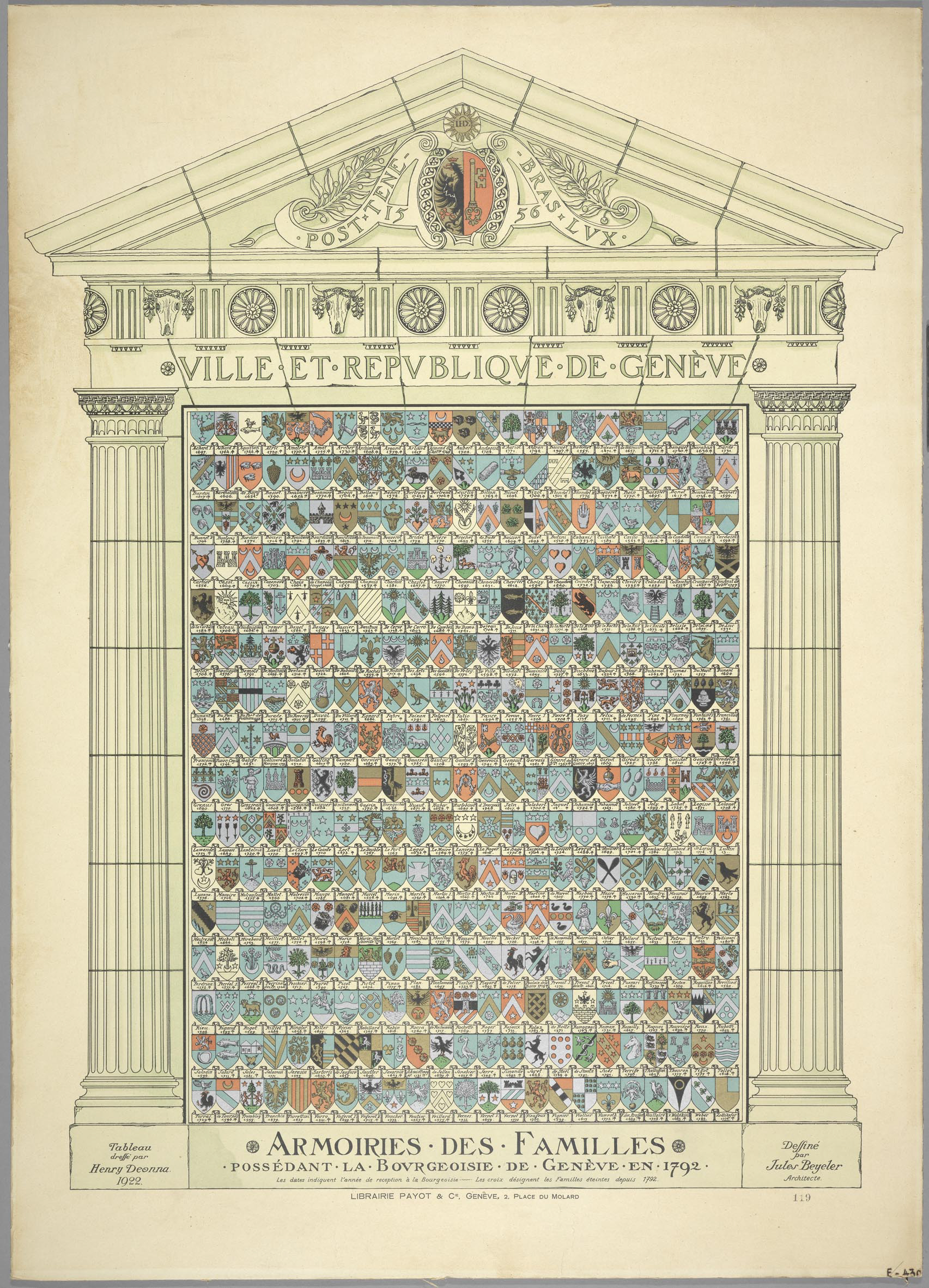 Armoiries des familles possedant la bourgeoisie de Geneve en 1792